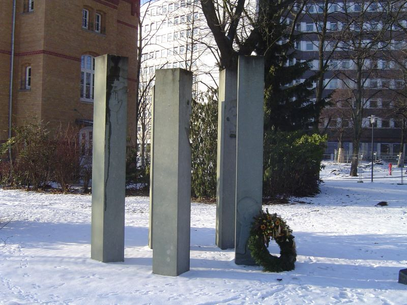 Mahnmal für die Opfer des Nationalsozialismus im Park der Westfälischen Klinik für Psychiatrie in Dortmund-Aplerbeck